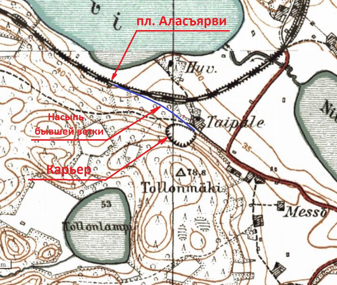 Схема Аласъярви